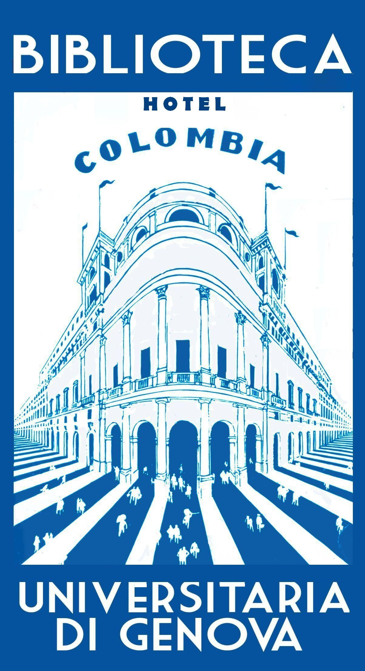 Immagine rappresentativa della Biblioteca Universitaria di Genova